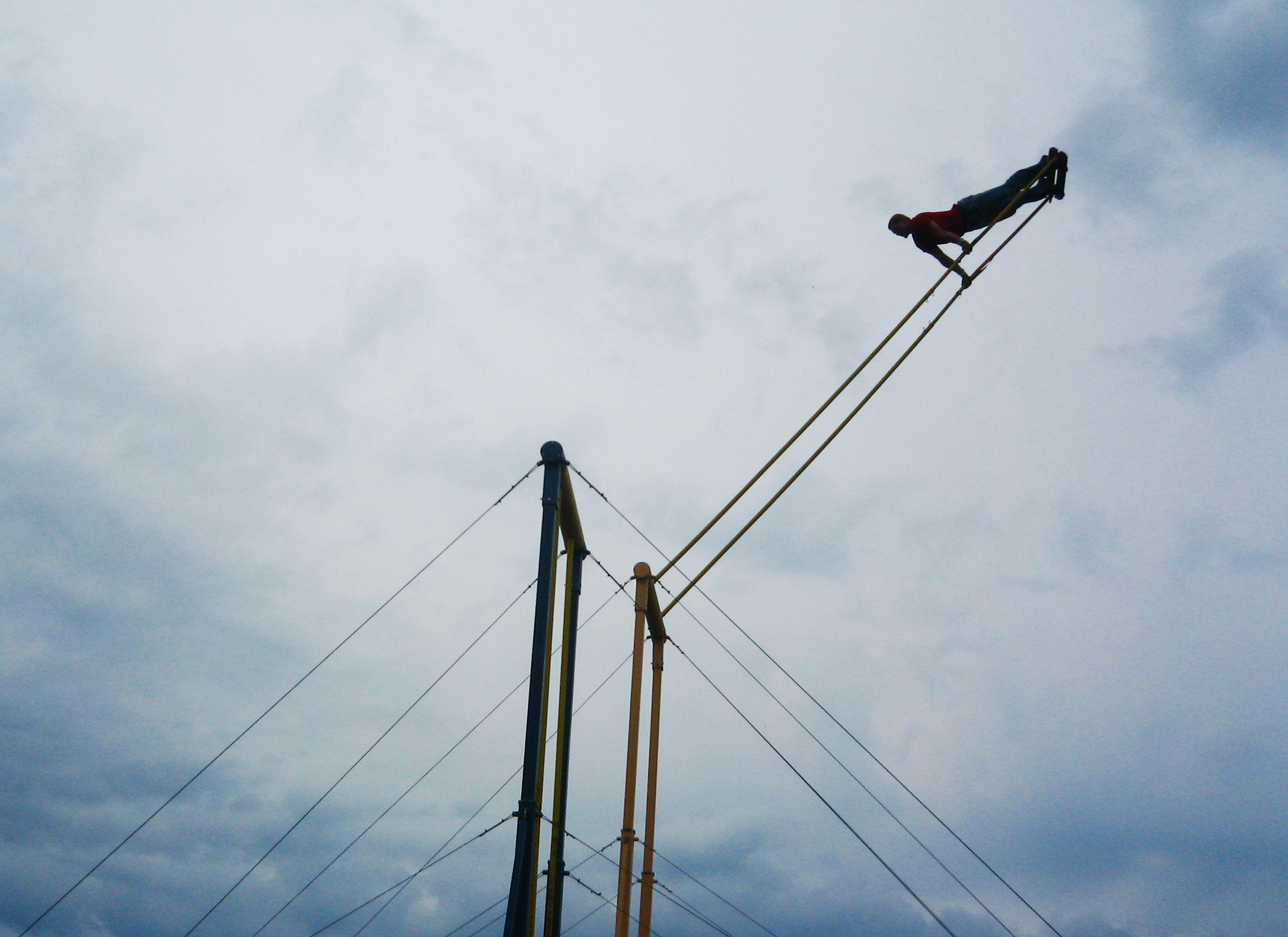 Kiiking